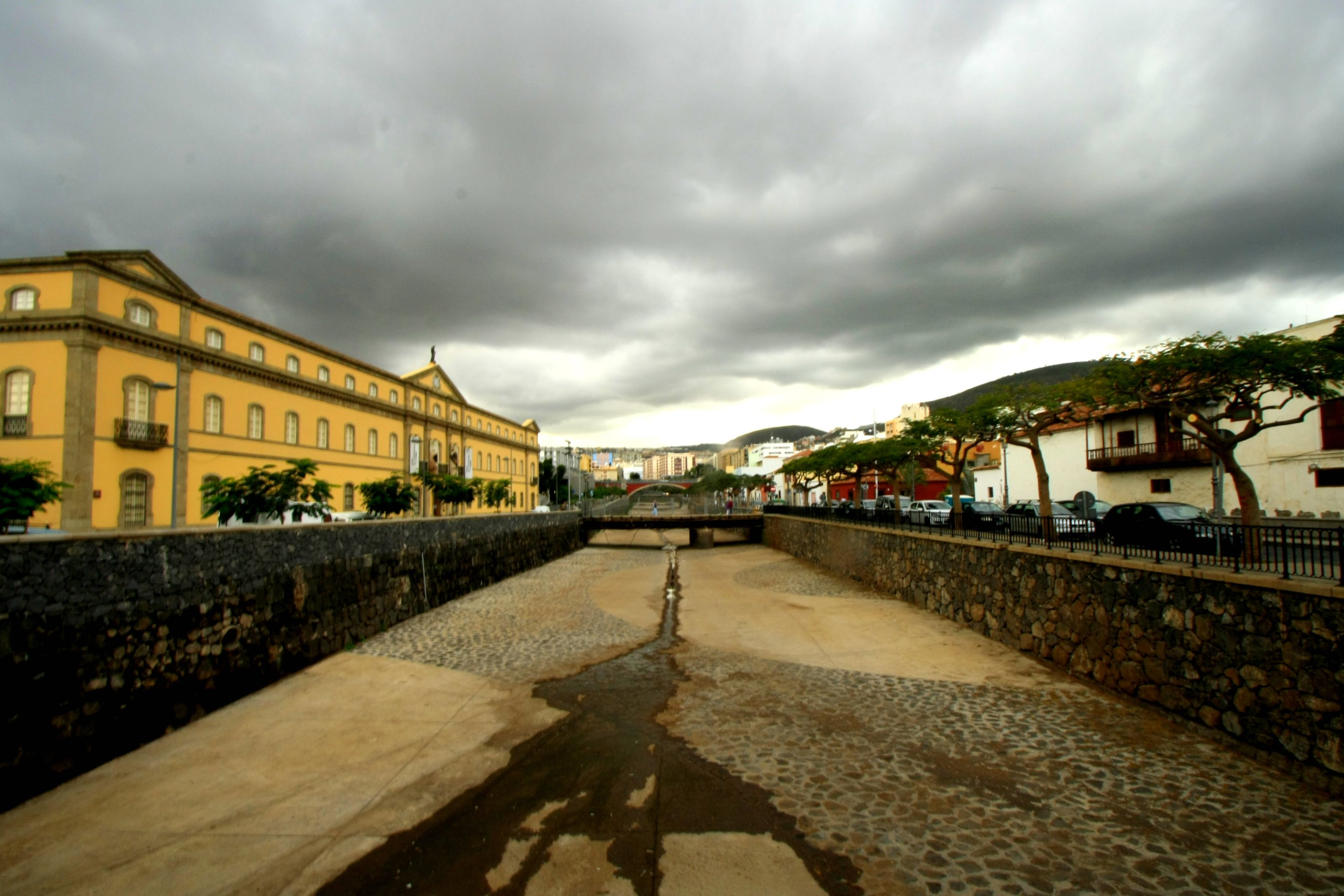 Barranco de Santos. A la izquierda Museo de la Naturaleza y el Hombre